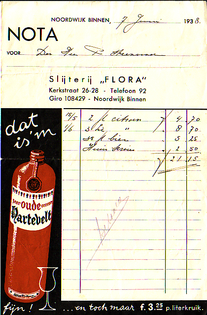 Factuur: Slijterij Flora, Noordwijk-Binnen. Met reclame voor Hartevelt Jenever.